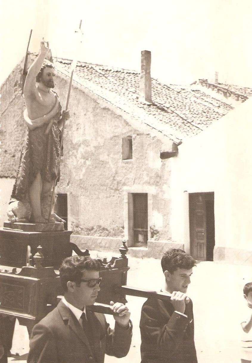 Fotografía tomada en 1945 a la imagen de San Juan Bautista en la plaza de la Iglesia de Sardón de Duero, Valladolid, España